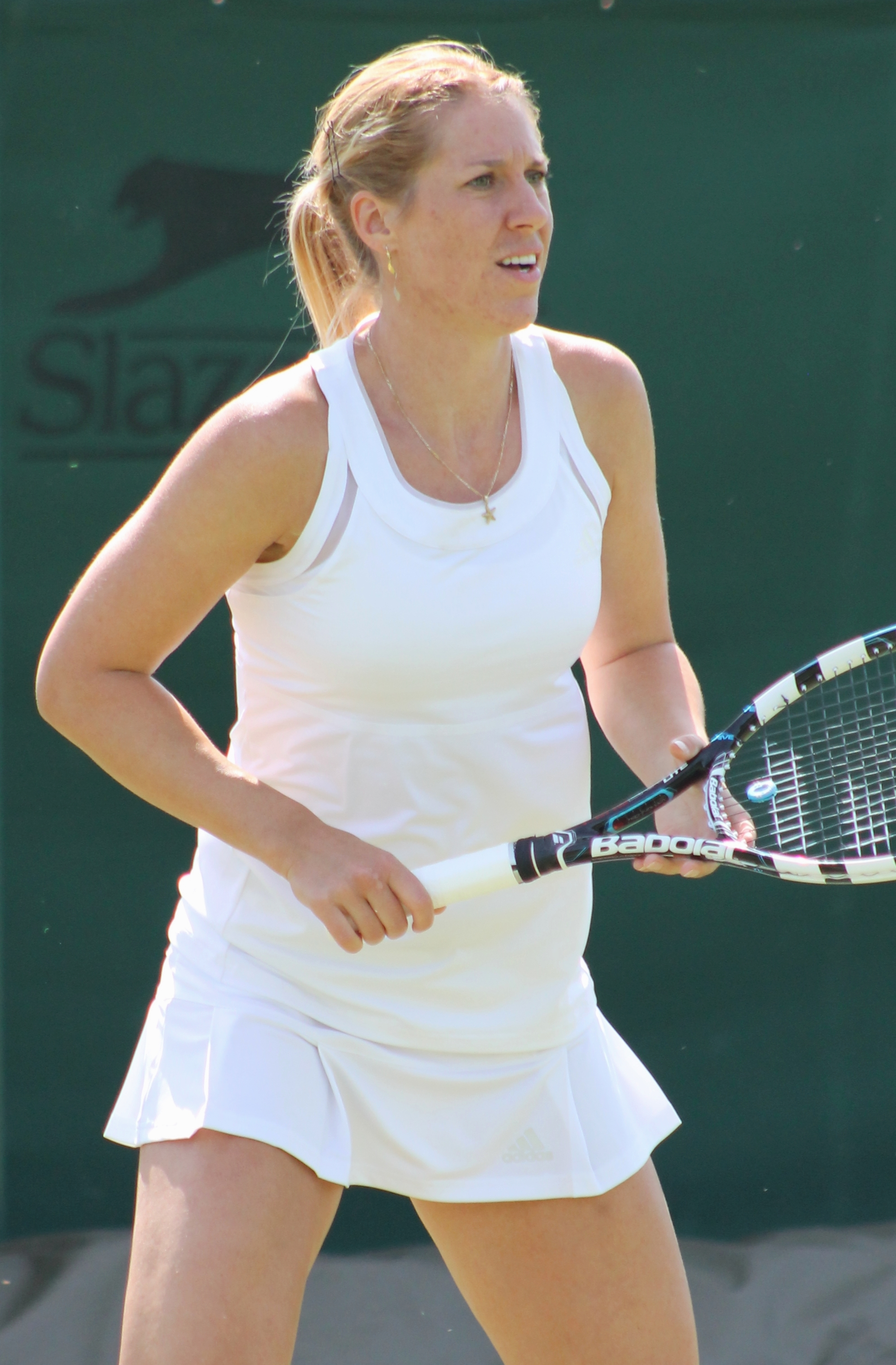 Savchuk WMQ14 (3)